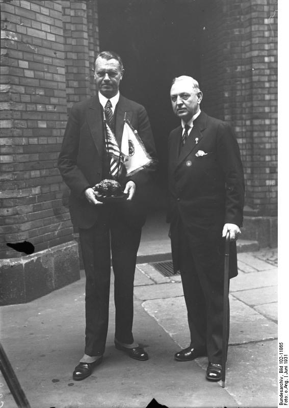 Der Bürgermeister von Los Angeles ehrt den Berliner Oberbürgermeister Dr. Sahm! Der Bürgermeister von Los Angeles John C. Porter (links) welcher augenblicklich in Berlin weilt, überreichte dem Berliner Oberbürgermeister Dr. Sahm (rechts) im Rathaus als Geschenk einen kleinen Broncebären mit dem Sternenbanner und dem Wappen von Los Angeles.